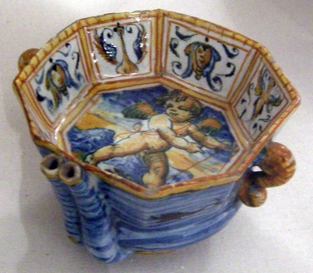 Museo Civico This is a photo of a monument which is part of cultural heritage of Italy.